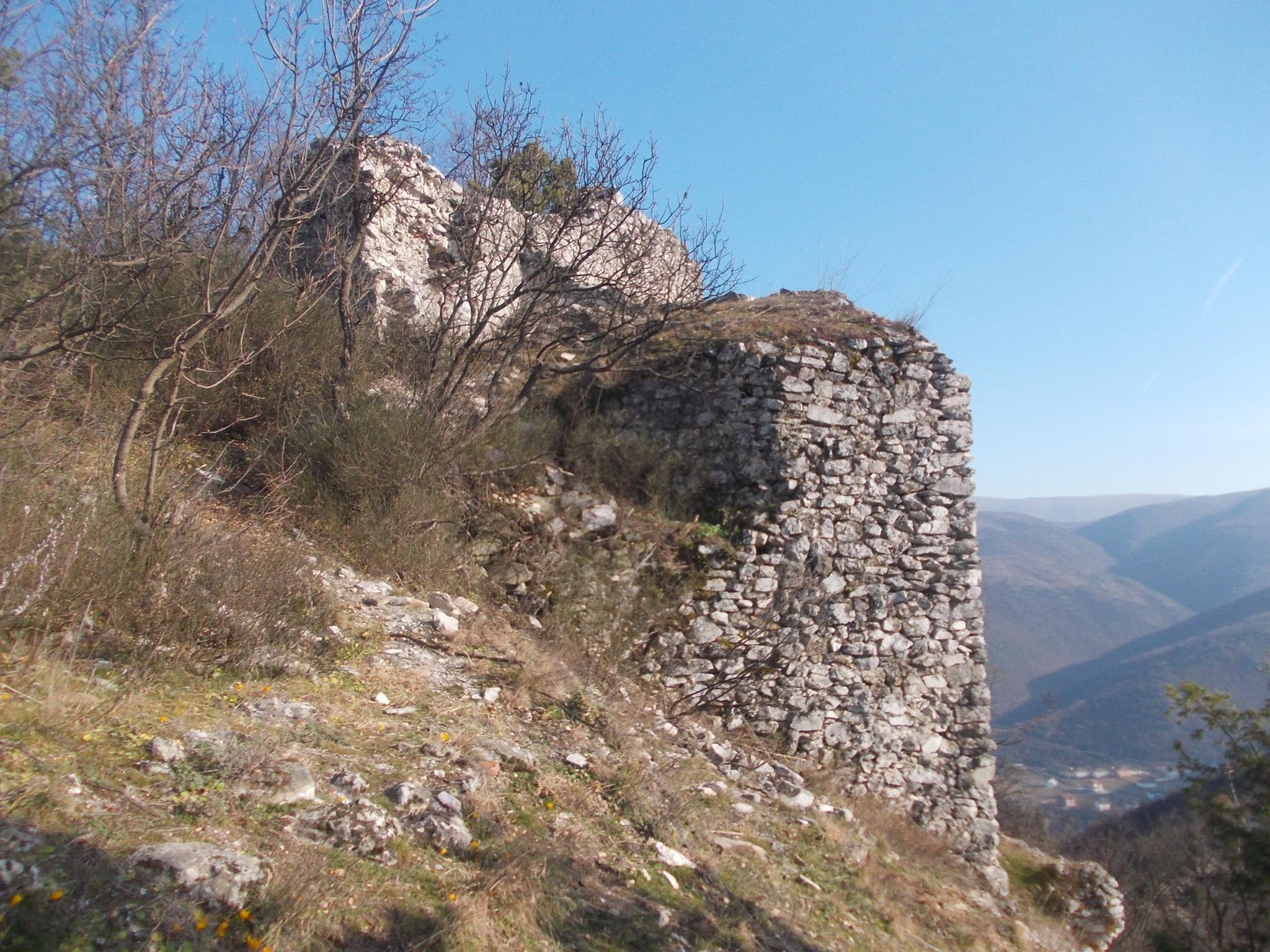 Поглед на Орашко Кале